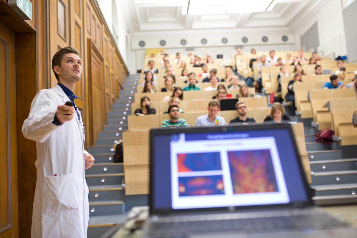 Vorlesung im Hörsaal 01.